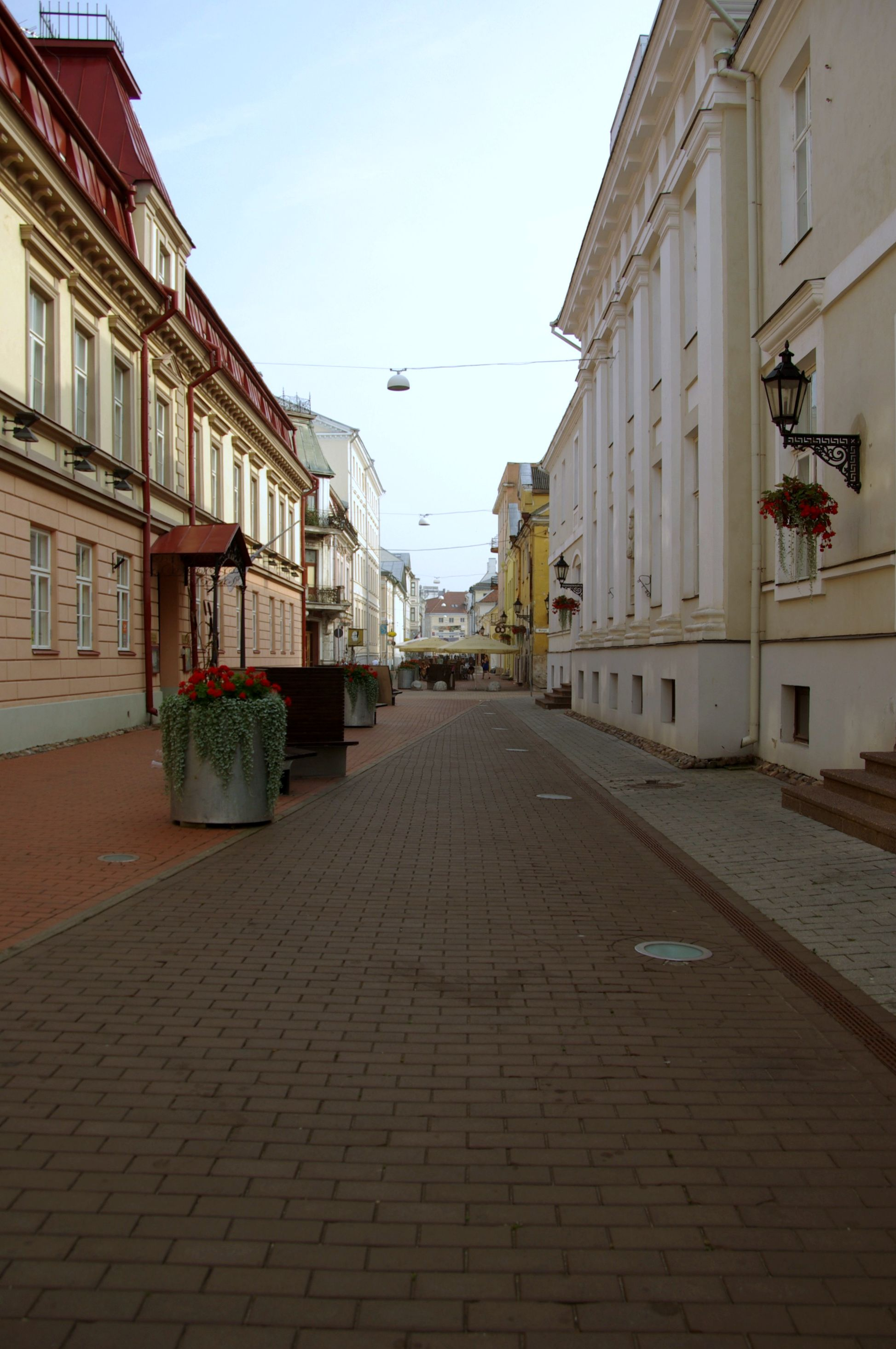 Rüütli tänav